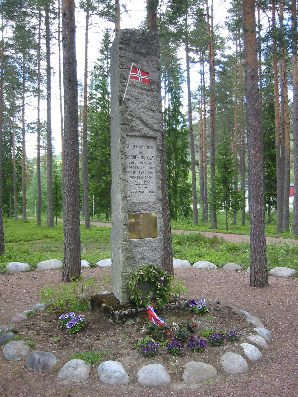 Minnesmerke Nybergsund